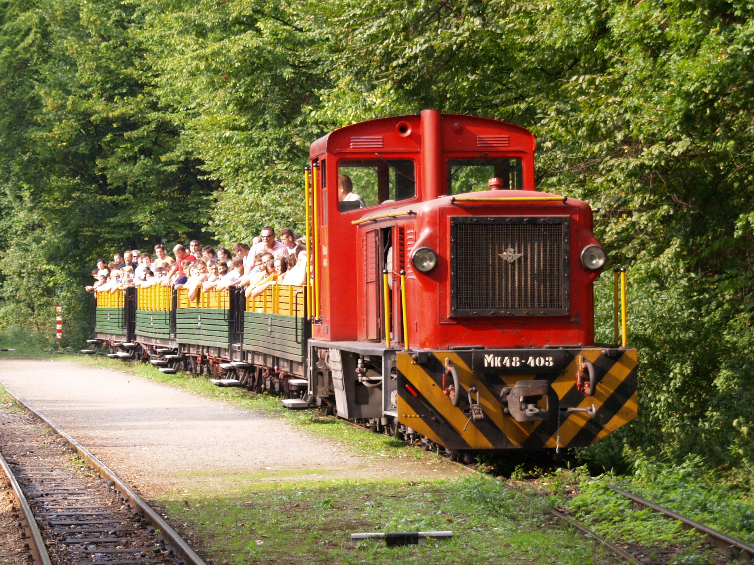 Mk48 403 a Szalajka-Fátyolvízesés végállomásra érkezik négy teli személykocsival